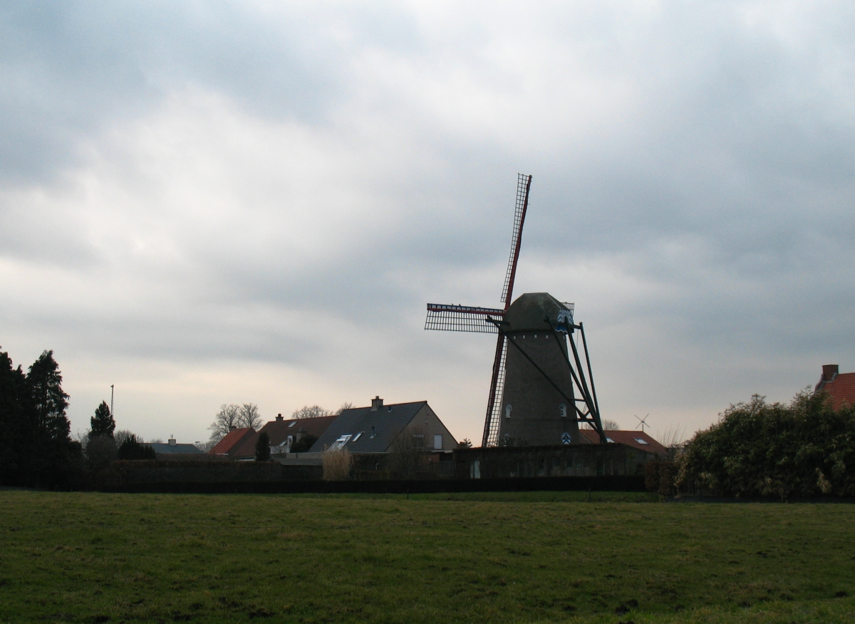 DeNachtegaal der Maatvennen te Ravels, provincie Antwerpen